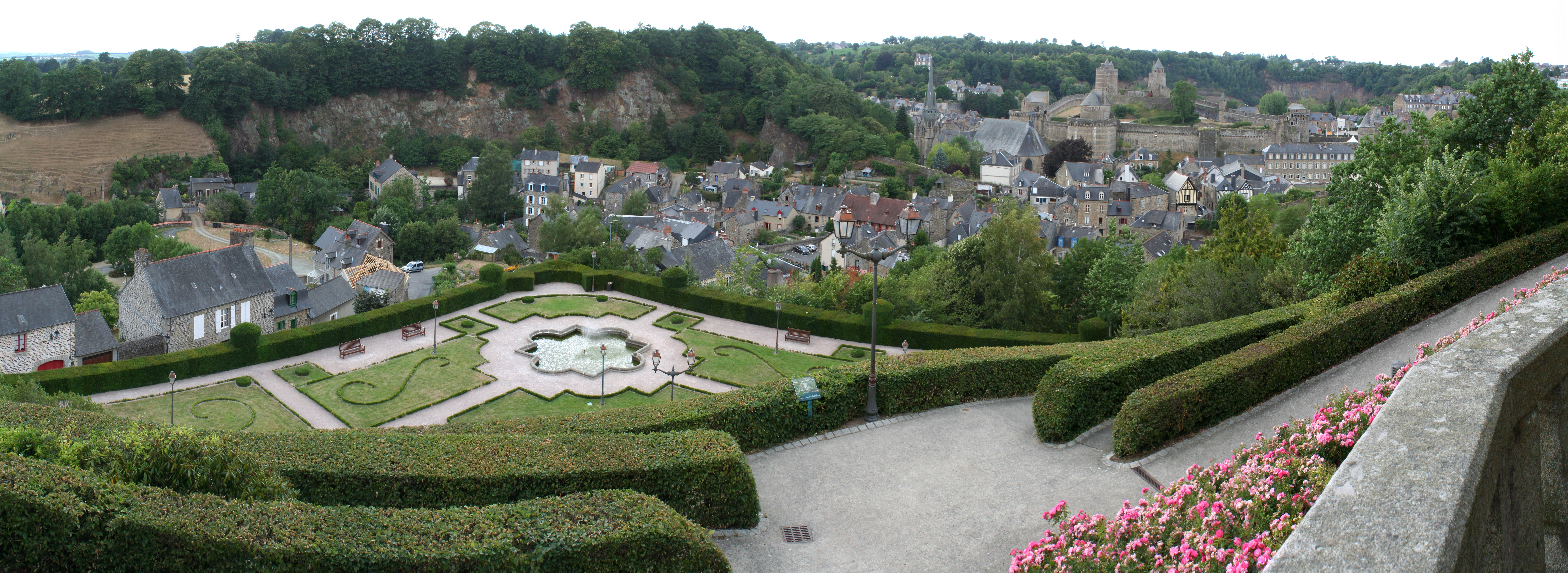 Vue de la basse-ville de Fougères et du château depuis le jardin public.